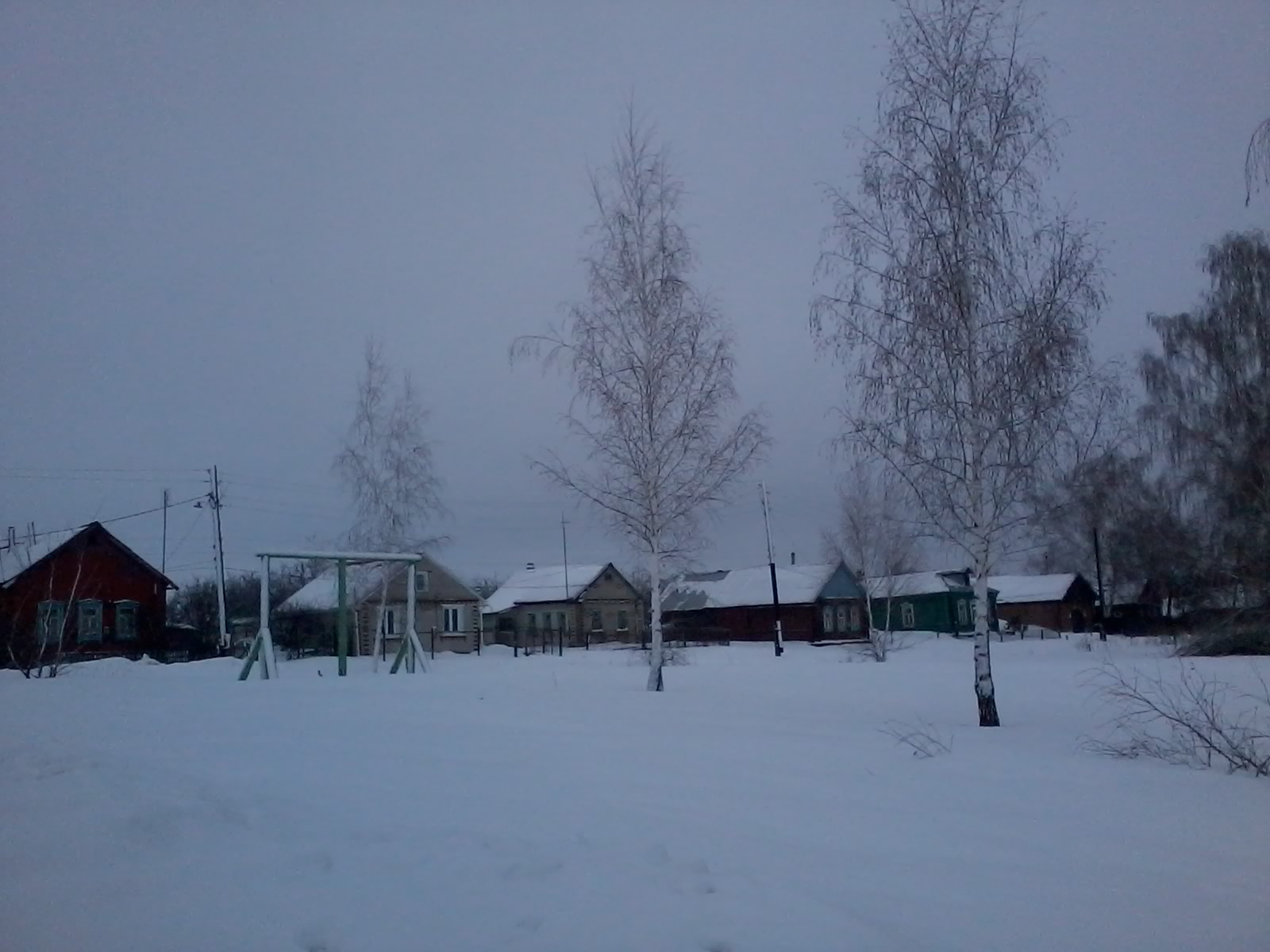 Вид на дома